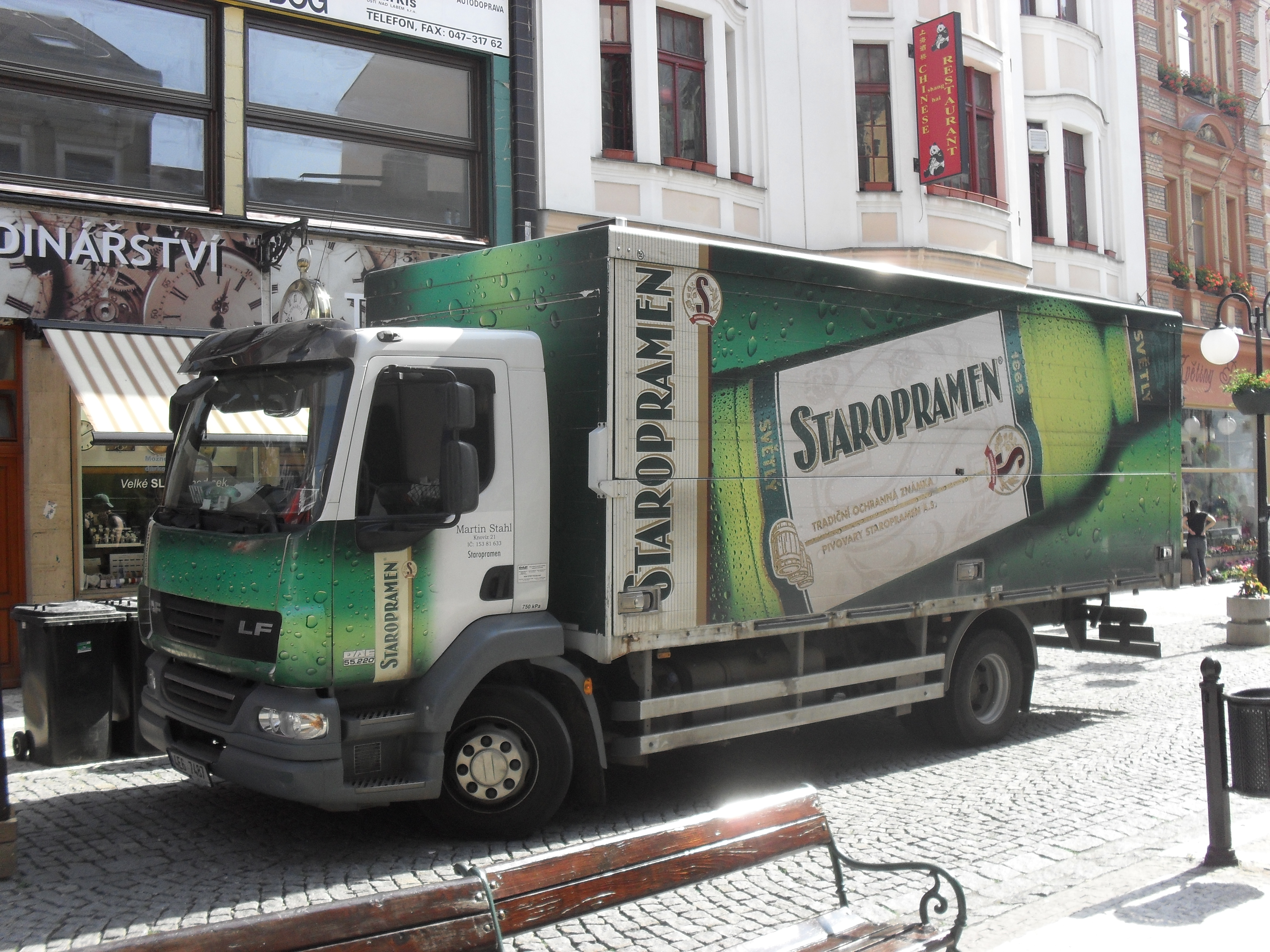 Česky: Pořízeno v Teplicích.